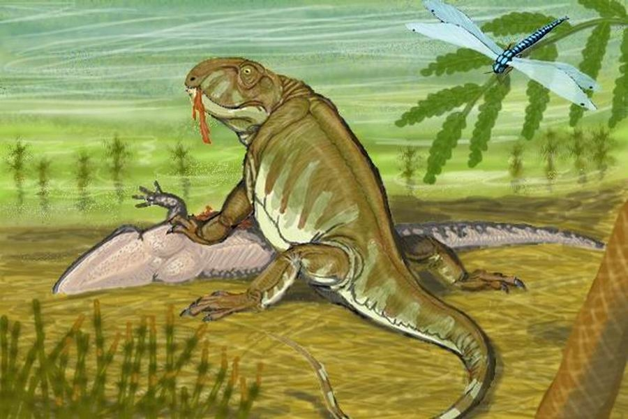 Хаптодус - пантелозавр